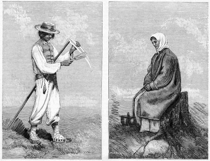 Беларуская (тарашкевіца): Крайск (Krajsk), сяляне з ваколіцаў мястэчка